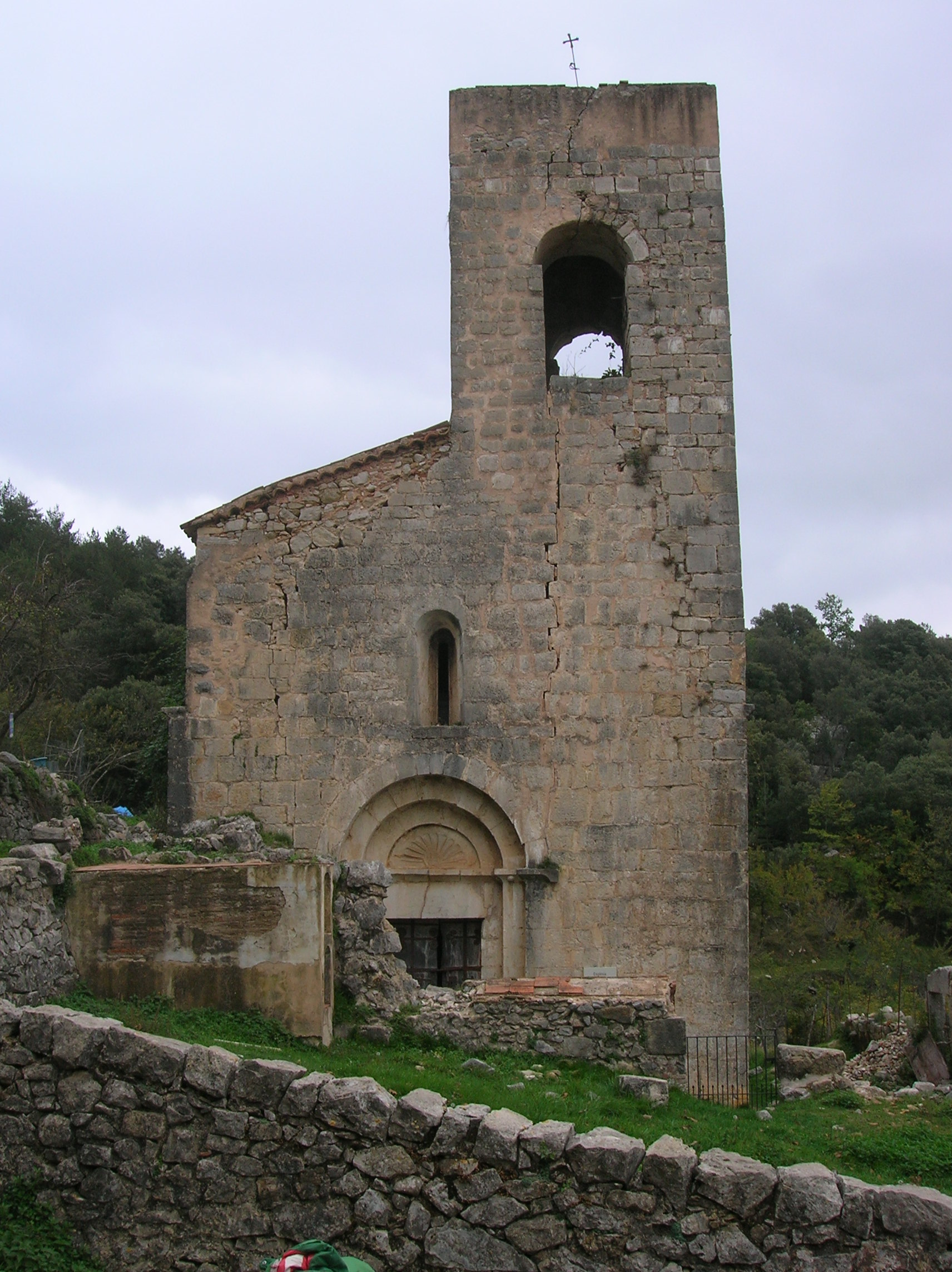 Sant Andreu de Lliurona